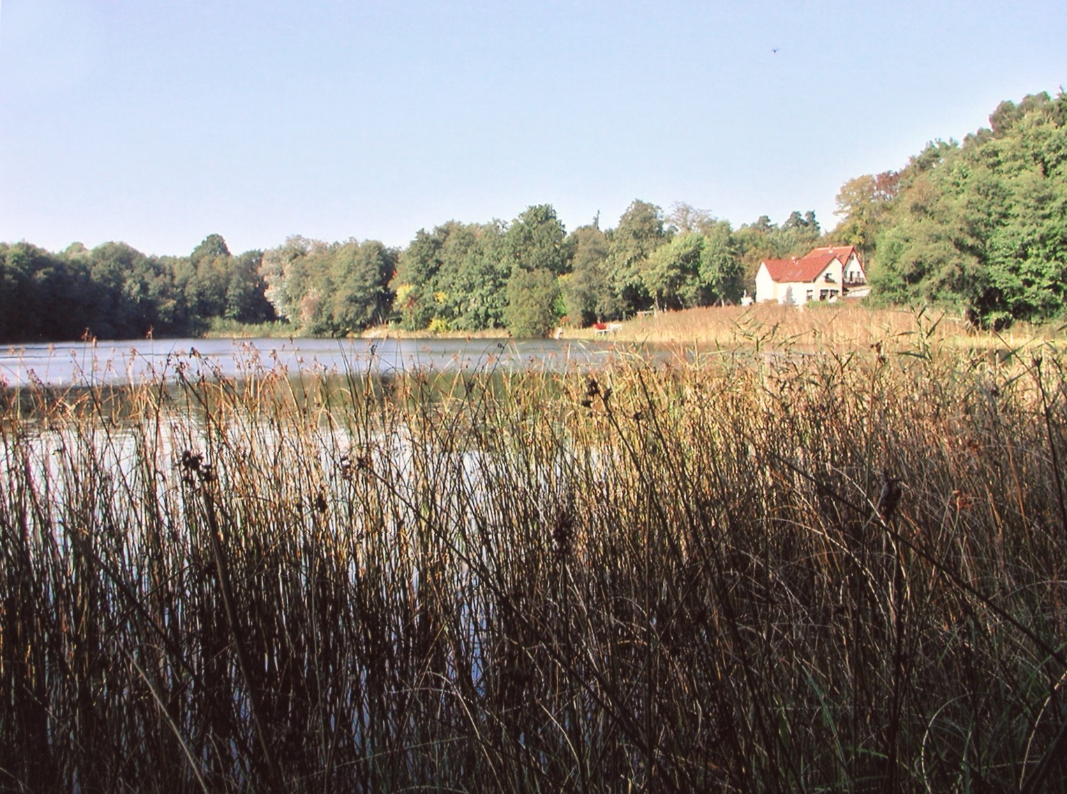 Ortsteil Wandlitz der Gemeinde Wandlitz